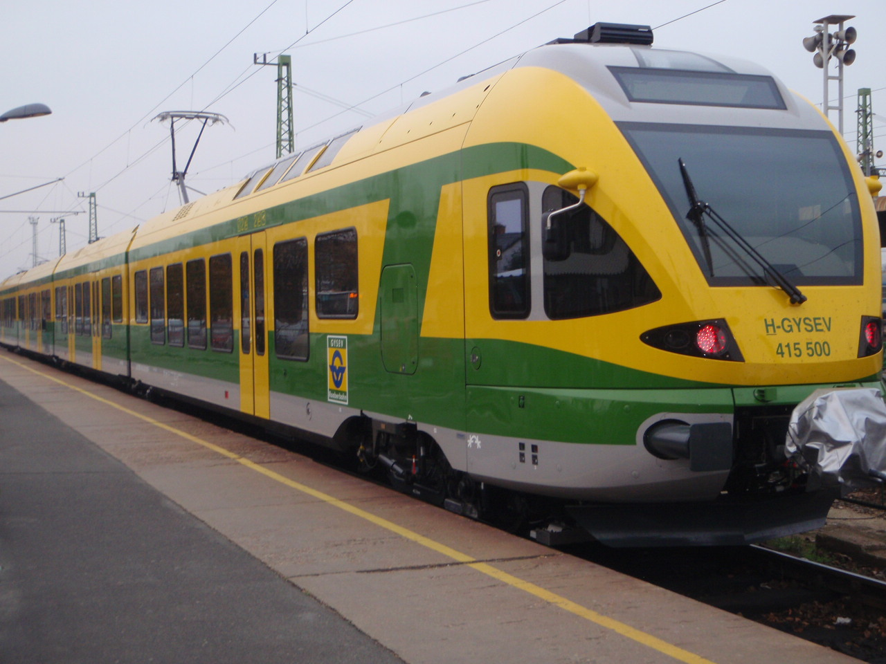 GYSEV Stadler Flirt, 1 a 10 új járműből